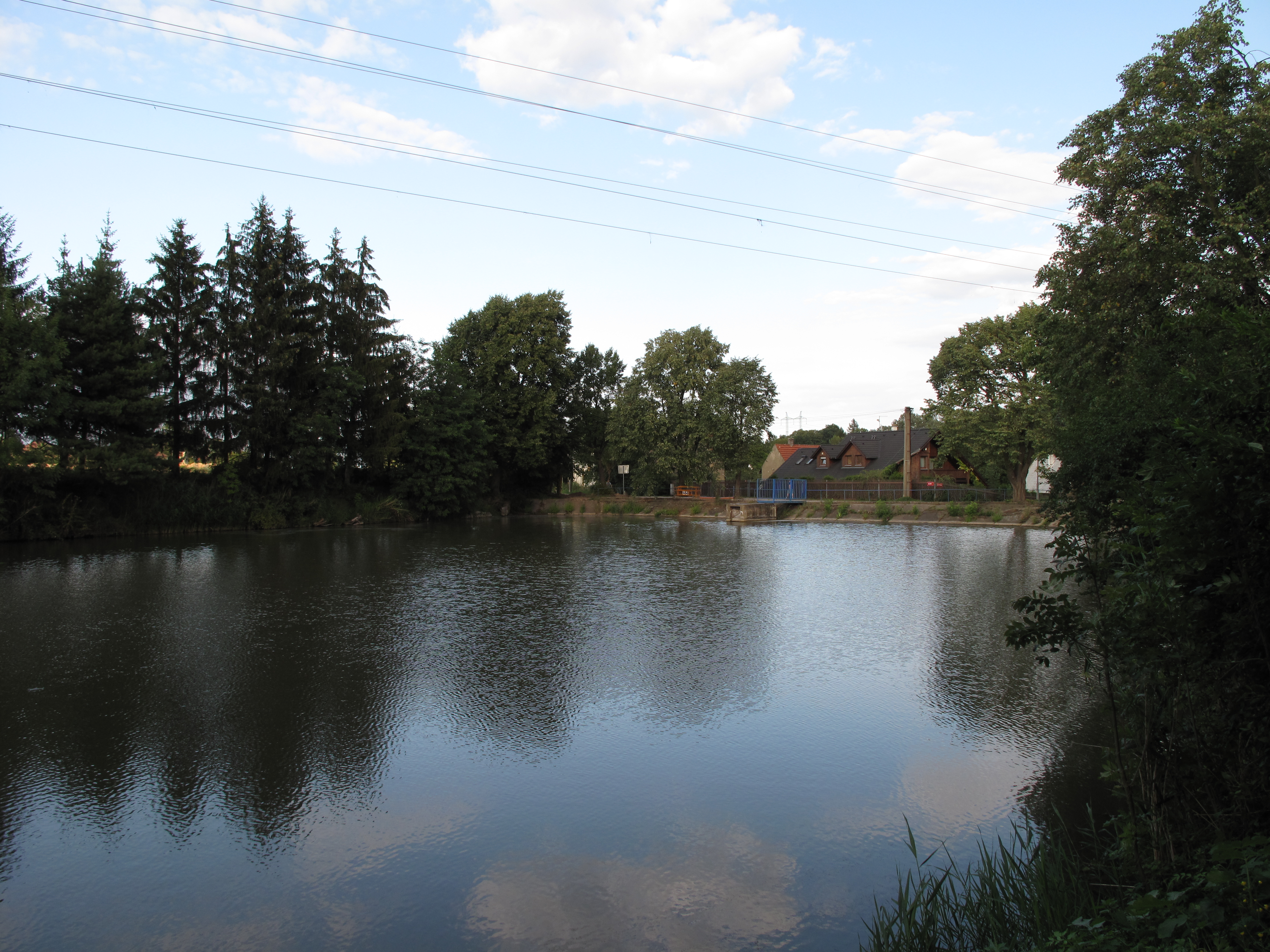 Vodní plocha Jordánek v Podolance. Okres Praha-východ, Česká republika.